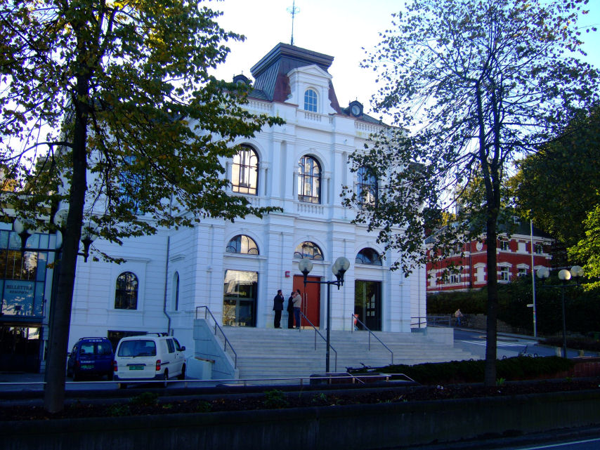 Stavanger gamle turnhall